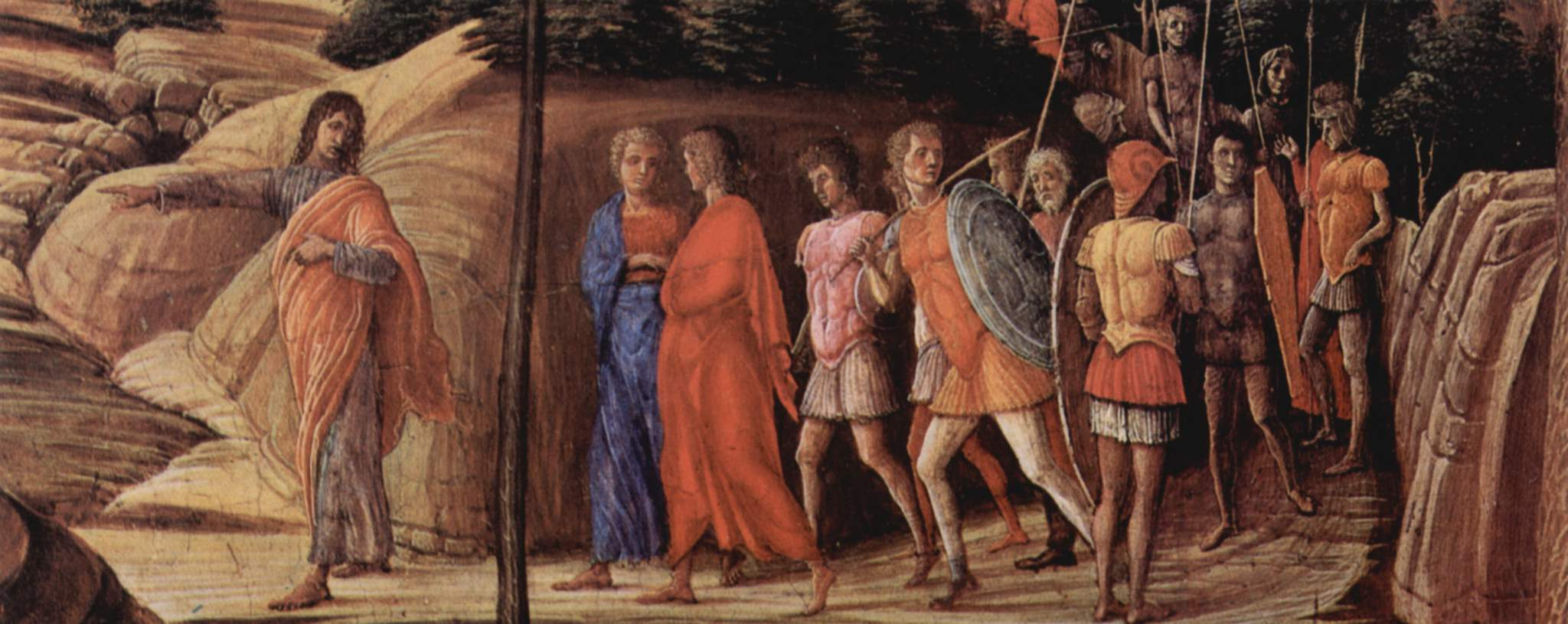 Herannahender Söldnerzug, von Judas angeführt